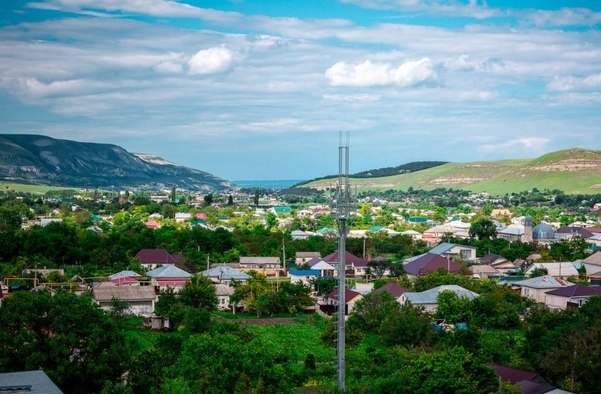 Вид на аул Хабез